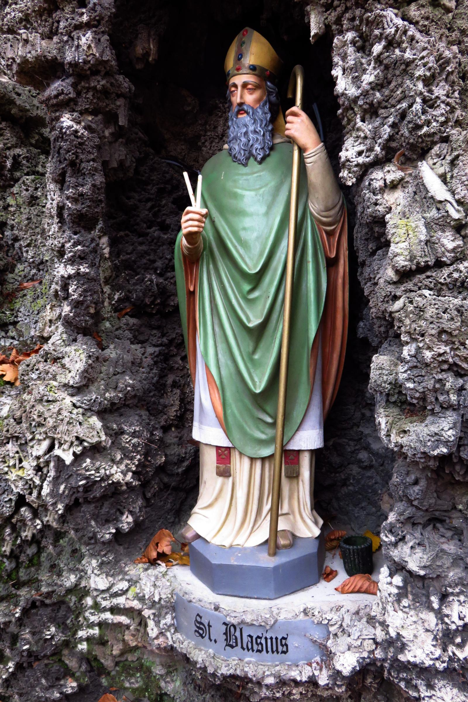 Grottenanlage in Hehn Heiligenpesch